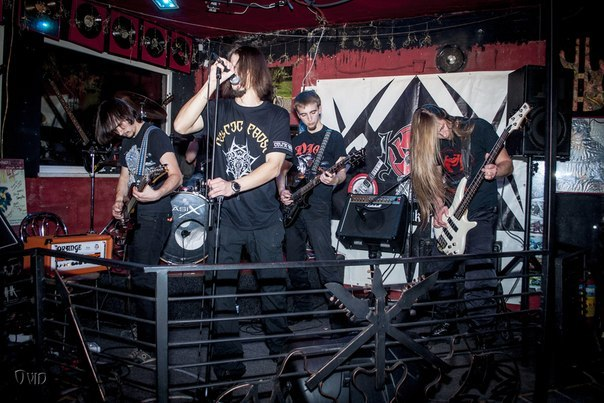 фото гурту Apostate